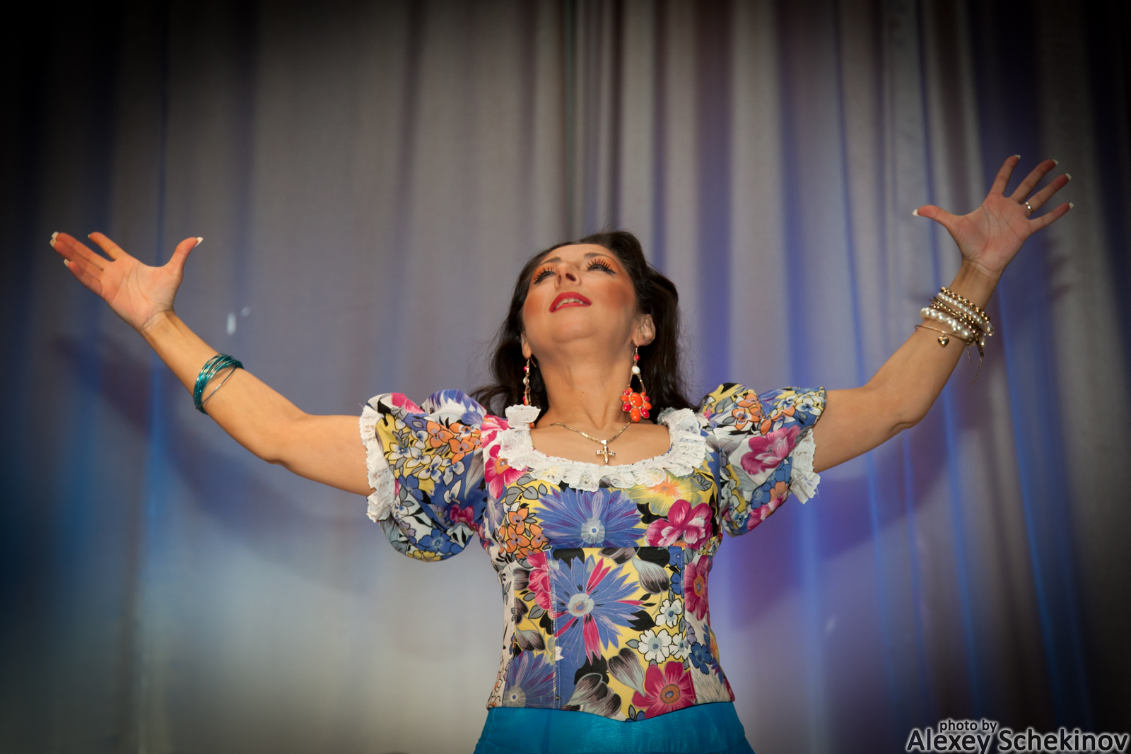 Московский музыкально-драматический цыганский театр «Ромэн»; концерт в ЦКиОМ города Северодвинска 23 февраля 2014 года. На снимке Заслуженная артистка России, прима коллектива Ольга Янковская; племянница Народного артиста СССР Николая Сличенко.